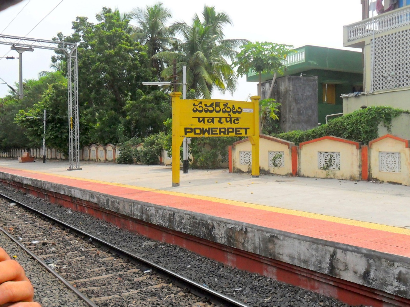 Powerpet Station inner view